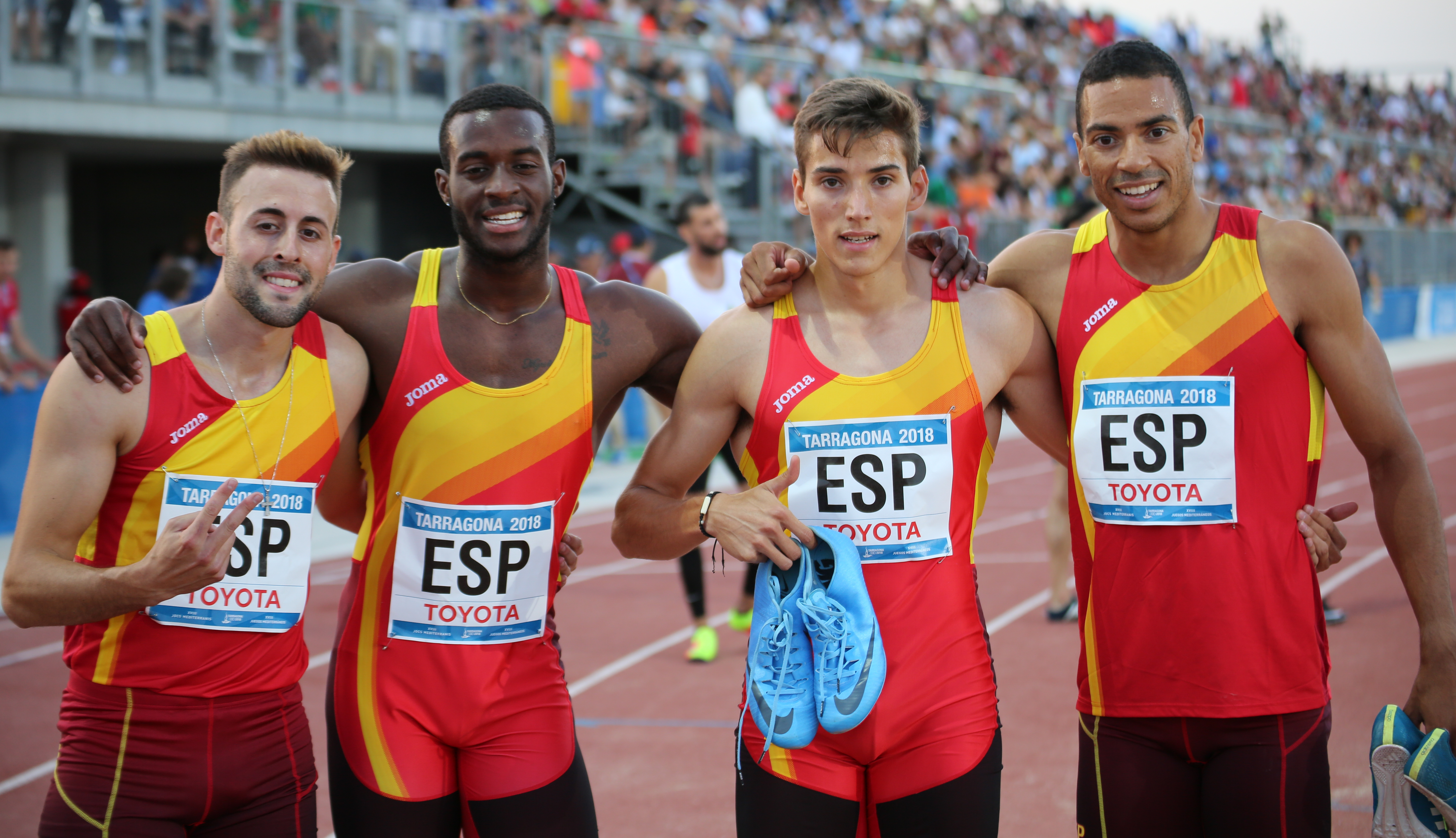 España en los relevos 4x400 en los Juegos del Mediterráneo 2018 (Lucas Búa, David Jiménez, Mark Ujakpor, Darwin Echeverry)